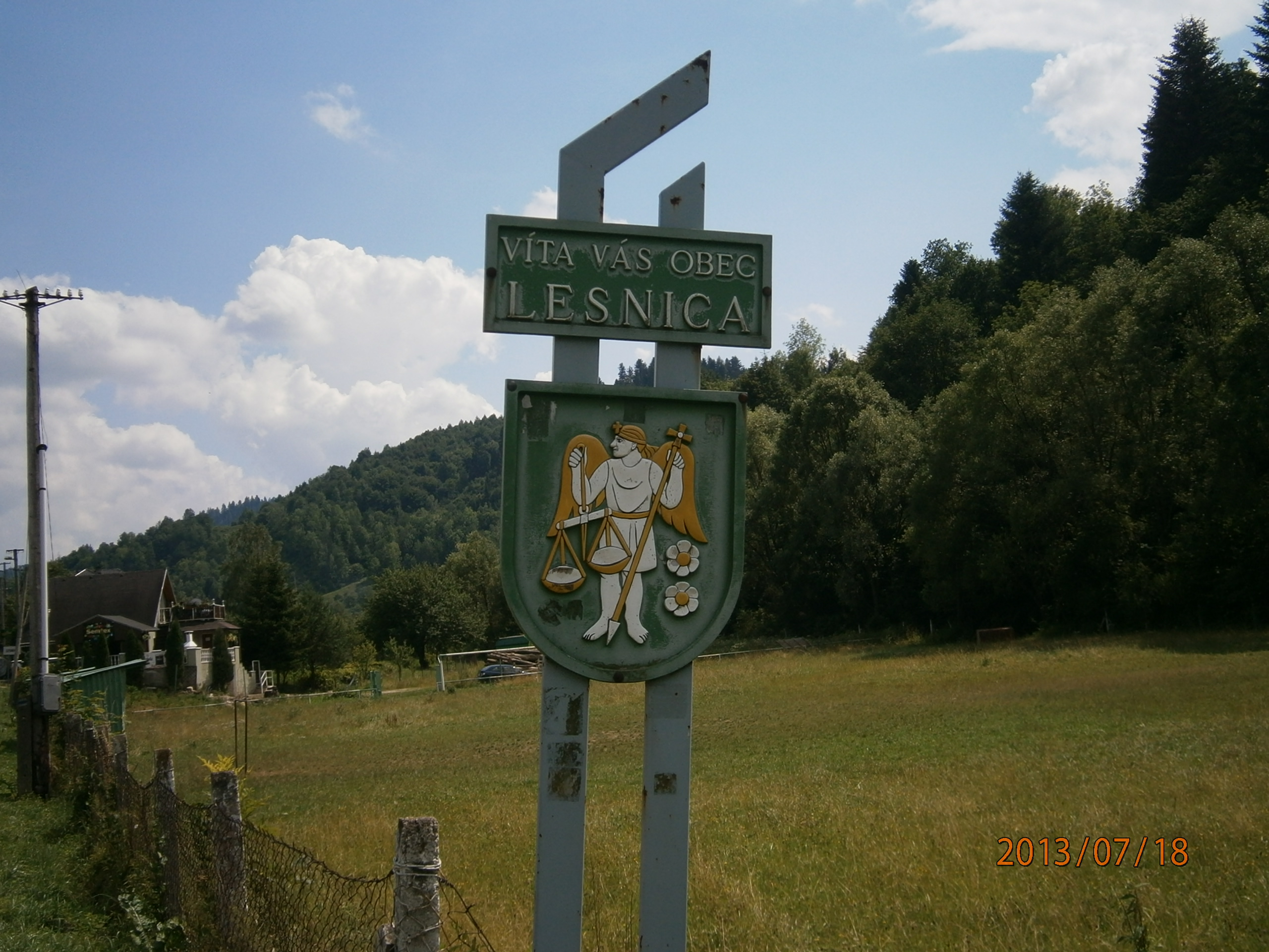 Witacz w Leśnicy. Zdjęcie zrobione podczas wczasów.